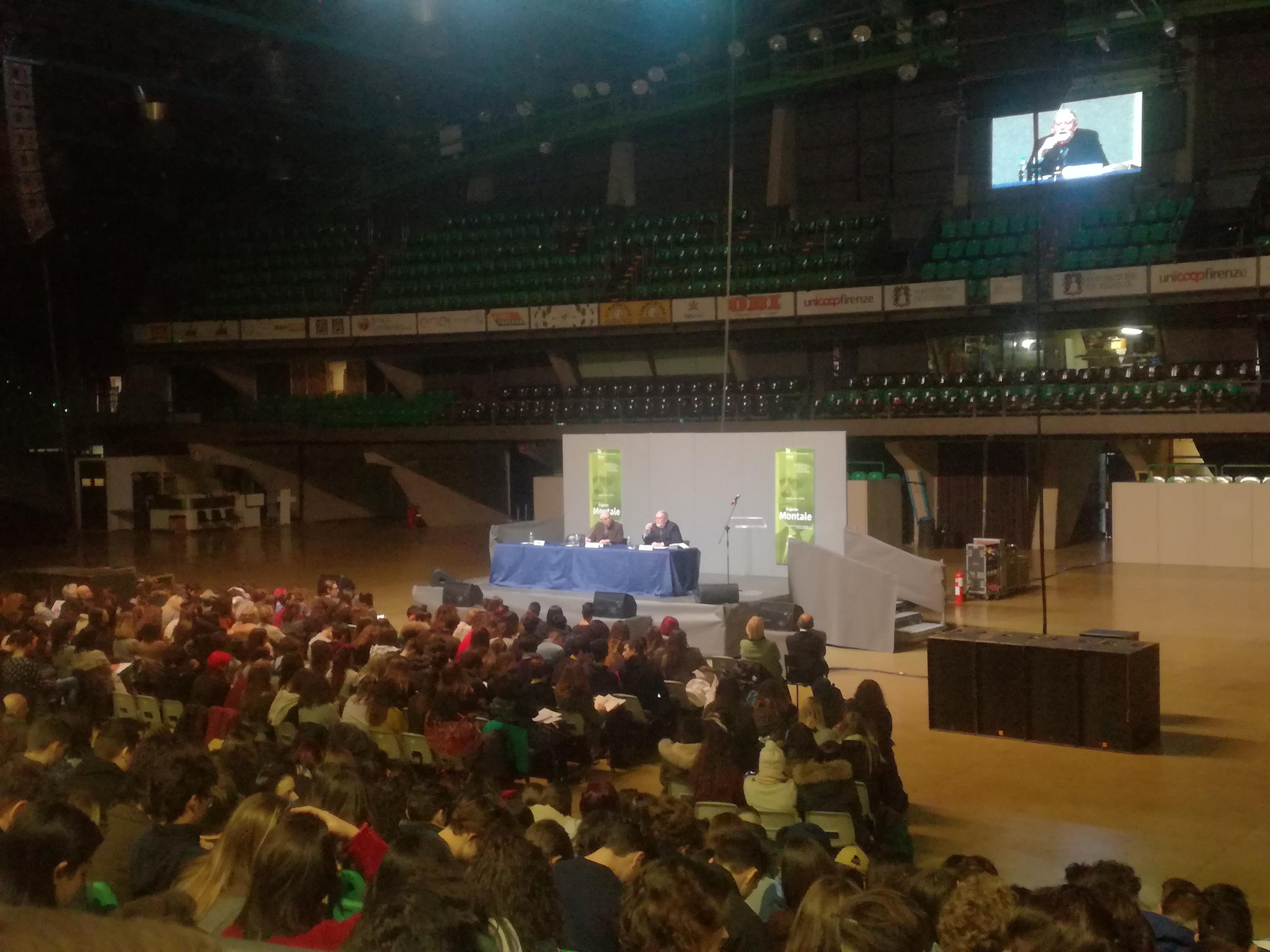 Colloqui Fiorentini 2018 (Nelson Mandela Forum): il professor Enrico Rovegno parla di Eugenio Montale